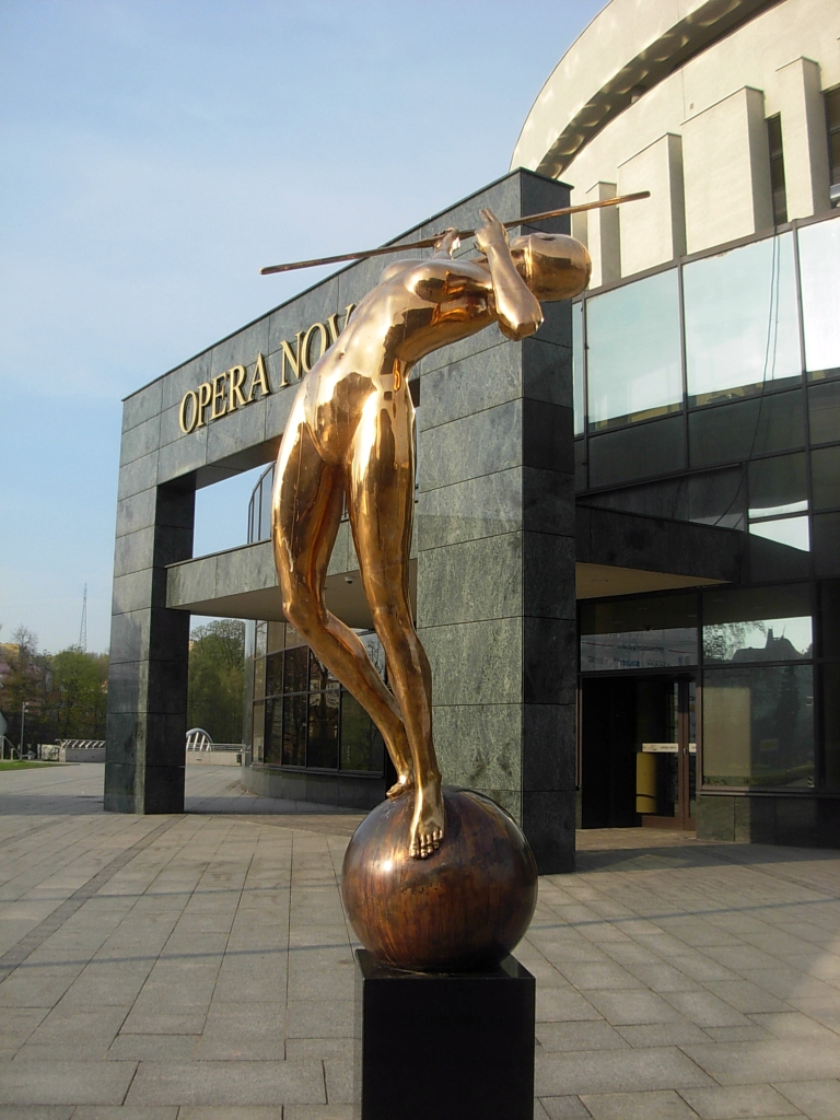 Rzeźba Łuczniczka Nova ustawiona przed Operą Nova w Bydgoszczy w 2013 roku